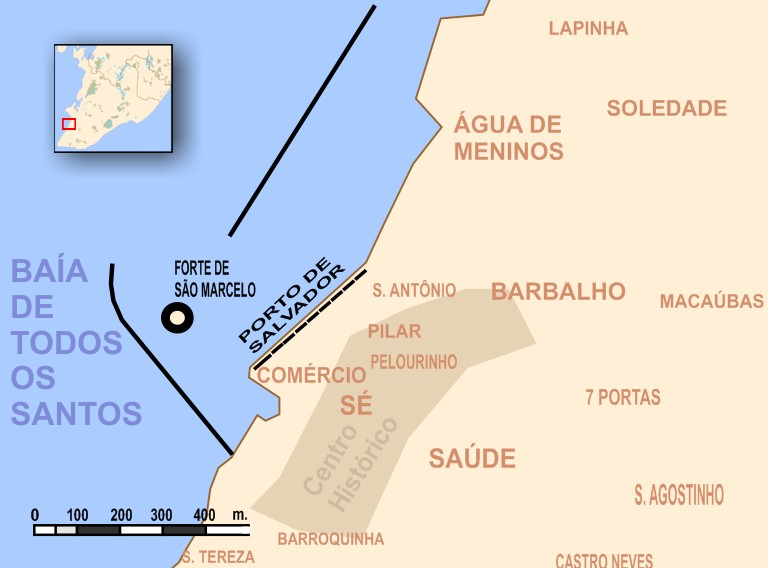 Mapa de Salvador (Bahia, Brazil) - Porto de Salvador, Centro Histórico (Bairros: Barbalho, Matatu, Água de Meninos, Comércio, Sé, Saúde, Pelourinho e outros).